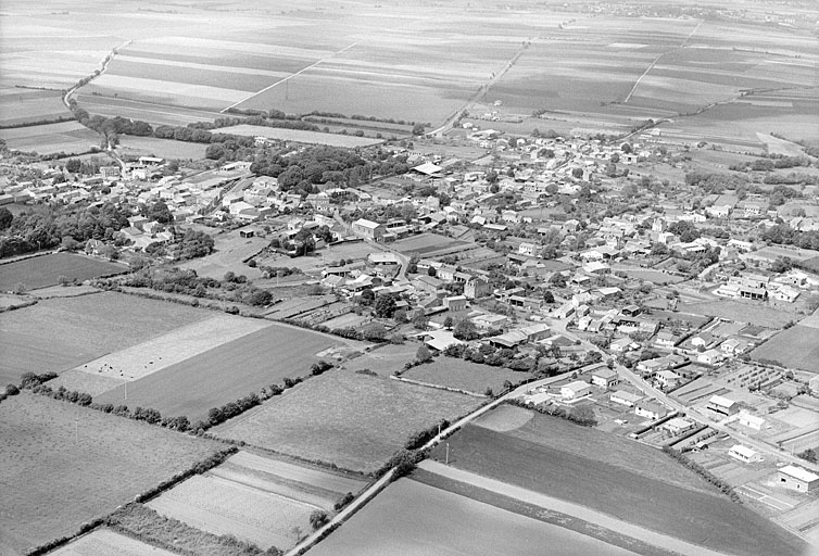 Photo aérienne noir & blanc de Mougon